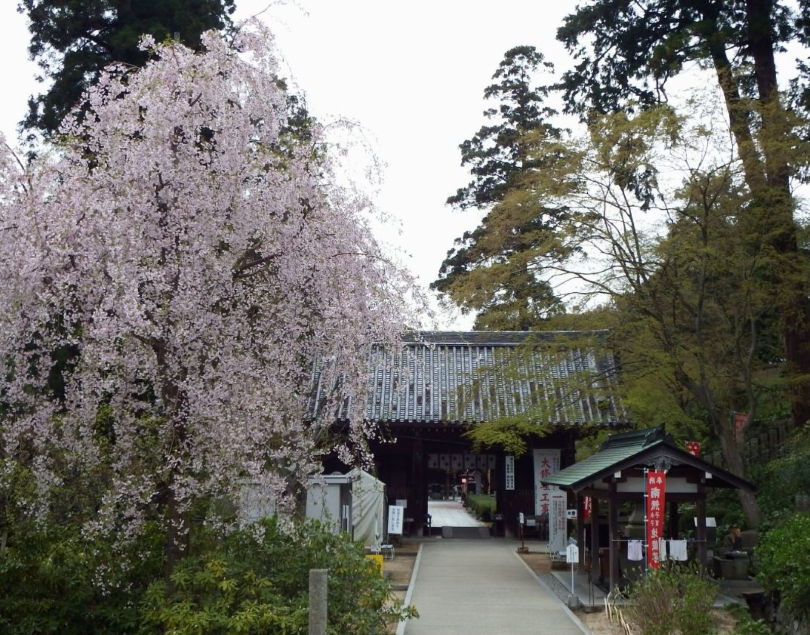 白峯寺 勅額門（重文）